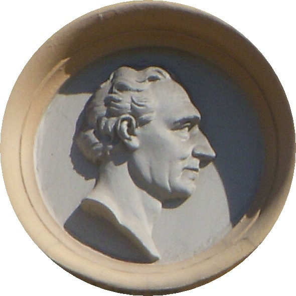 Medaljong av Nordewall på Gamla Jernkontorets hus på Norrmalm i Stockholm